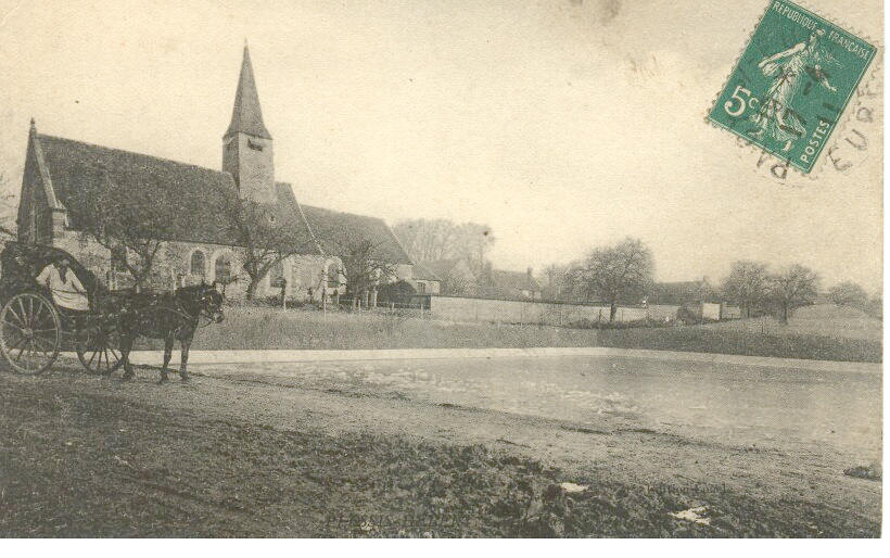 Eglise du Plessis Hébert